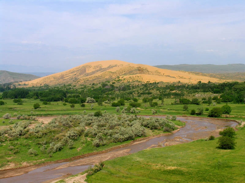 Бархан 'Сары-Кум', Кумторкалинский район This image is related to the protected area of Russia number 0510023